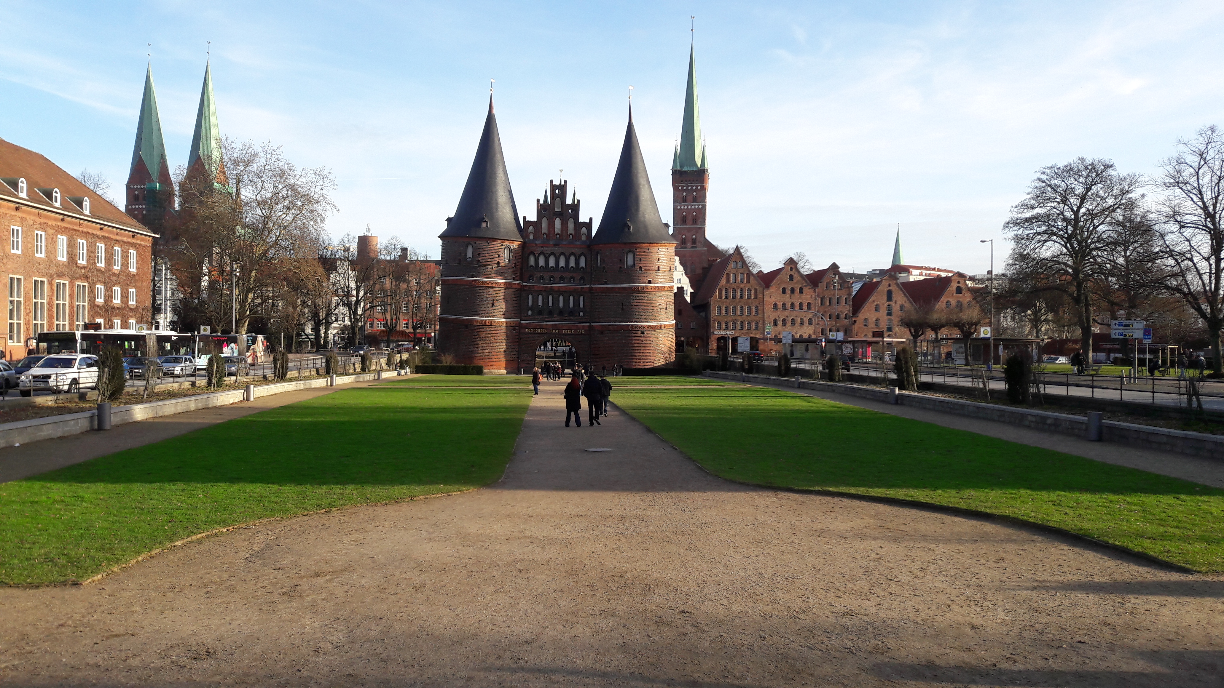 Porta e vjetër në Lybek